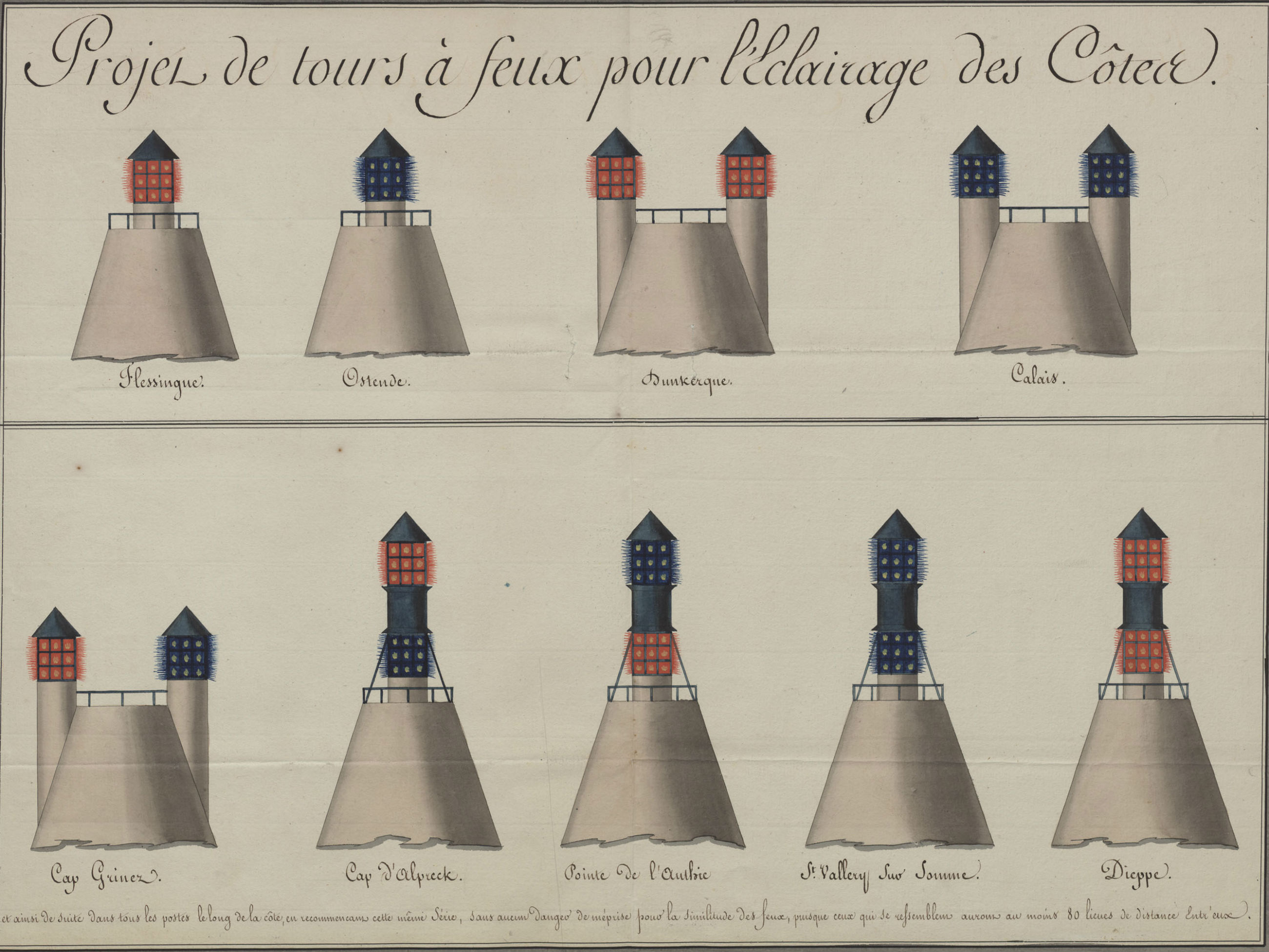 "La machine était composée d'un mât qui s'élevait de 20 à 30 pieds ; au bout de ce mât était une vergue de 18 pieds placée en forme de croix ; on y avait suspendu par des cordes 3 globes d'osier... Un 4e globe était placé à 2 pieds au-dessus de la maisonnette. Le Contre-amiral forma des figures en hissant ces boules d'osier à des positions variées d'autant de manières qu'il voulait avoir de signaux. La même méthode fut employée pendant la nuit et les succès furent les mêmes ; pour cela l'auteur substitua des lanternes à ces globes"5.